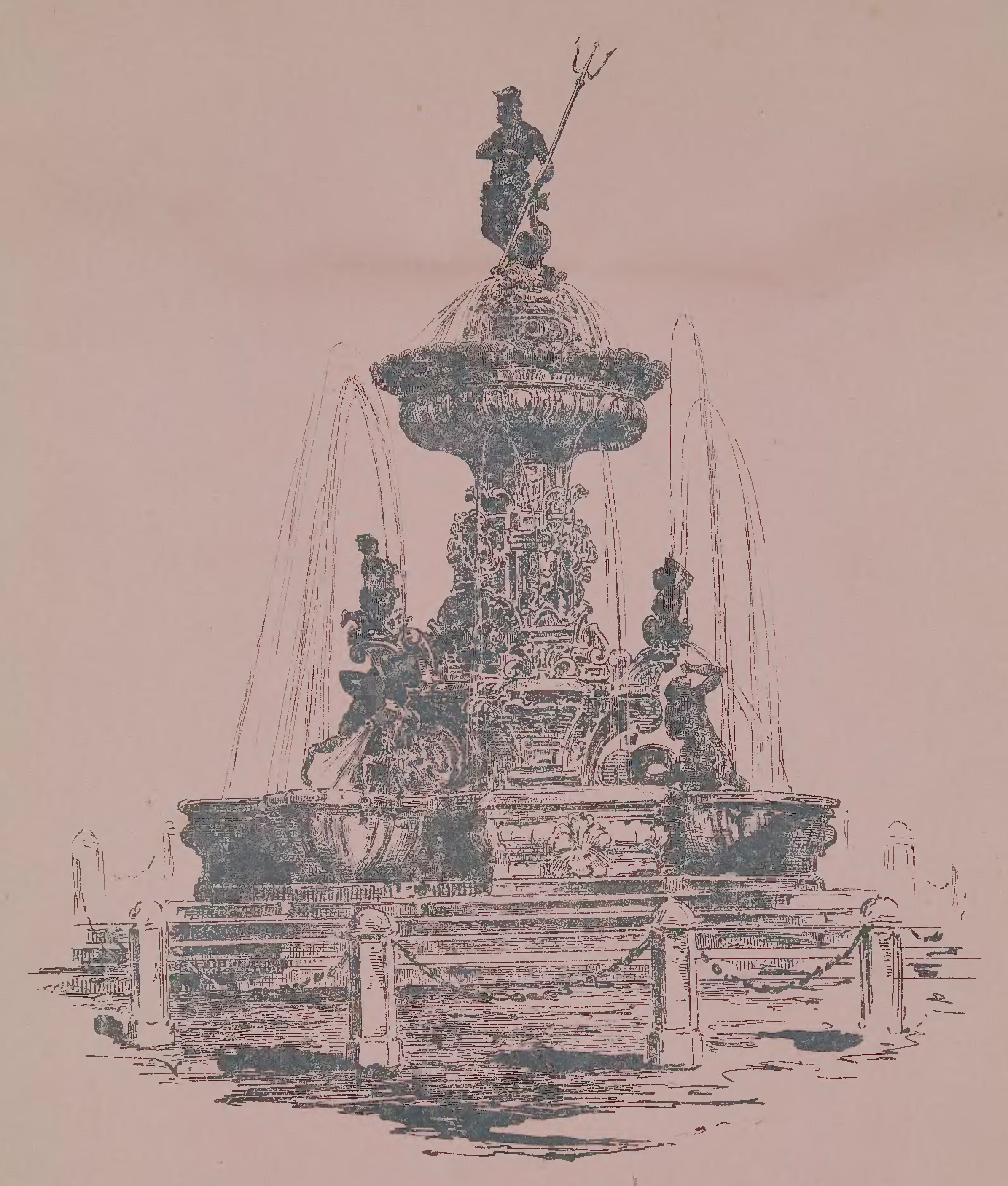 Poesia di Romedio Callicioli sulla fontana nettuniana di Trento